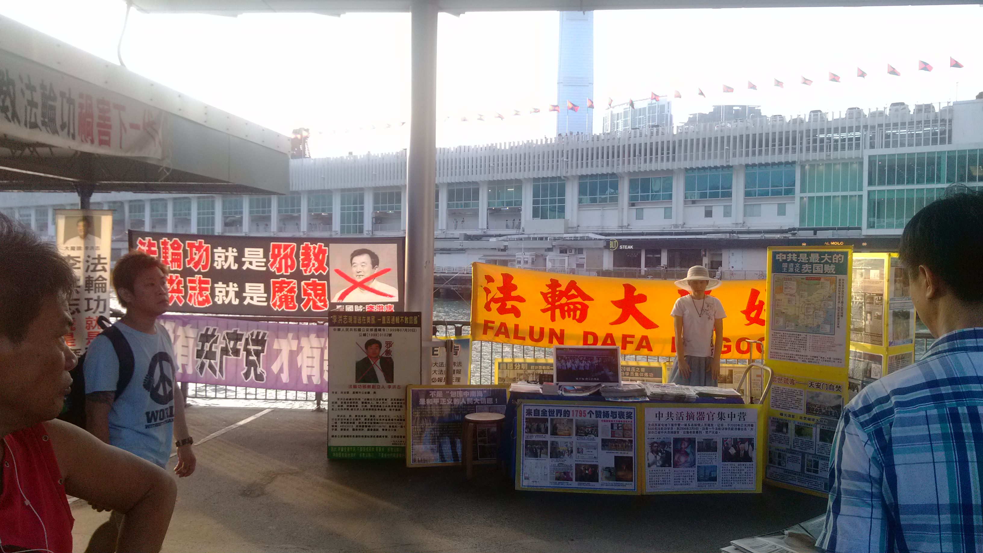 法轮功宣传者和反法轮功宣传者在香港尖沙咀渡轮码头比邻宣传。